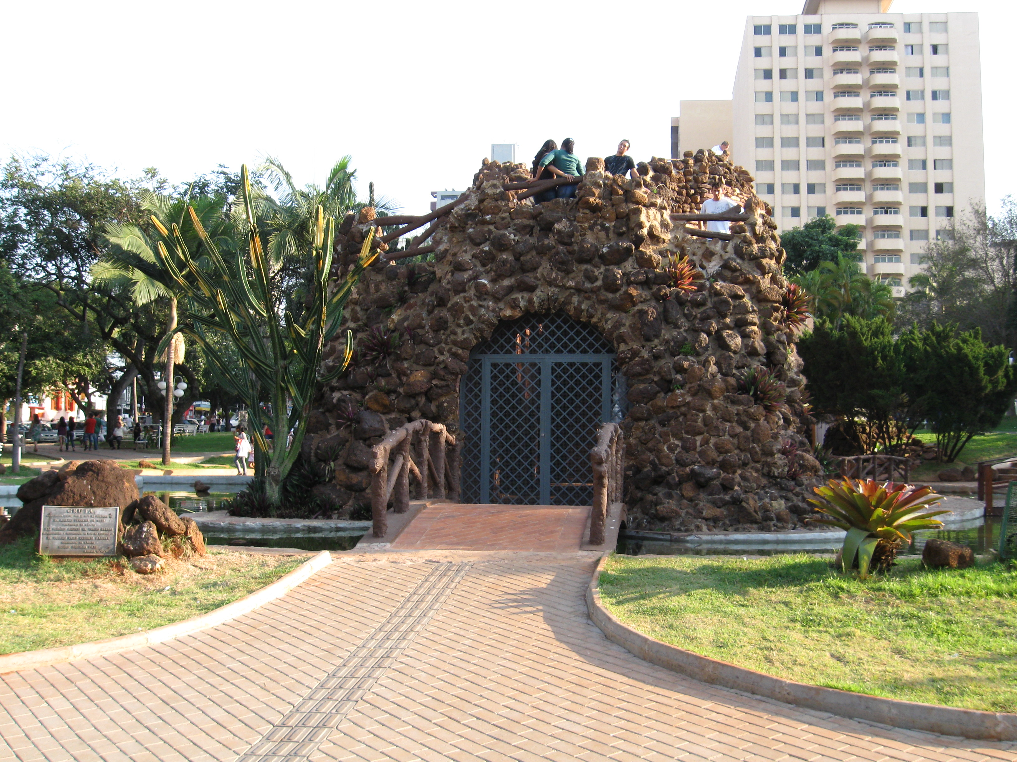 Foto da gruta na praça Toledo Barros em Limeira/SP